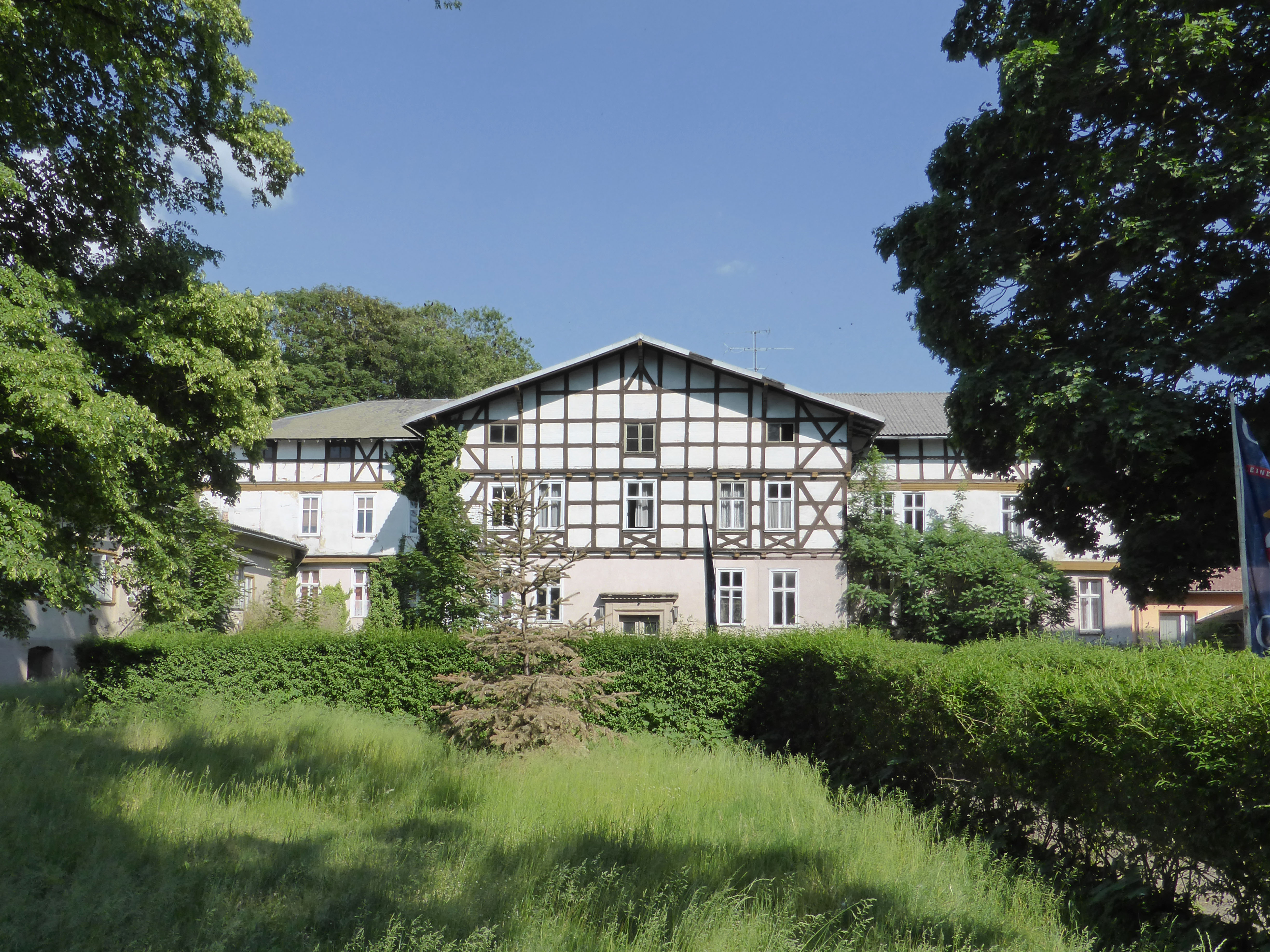 Schloss der Grafen von der Schulenburg in Beetzendorf, Vorderseite.